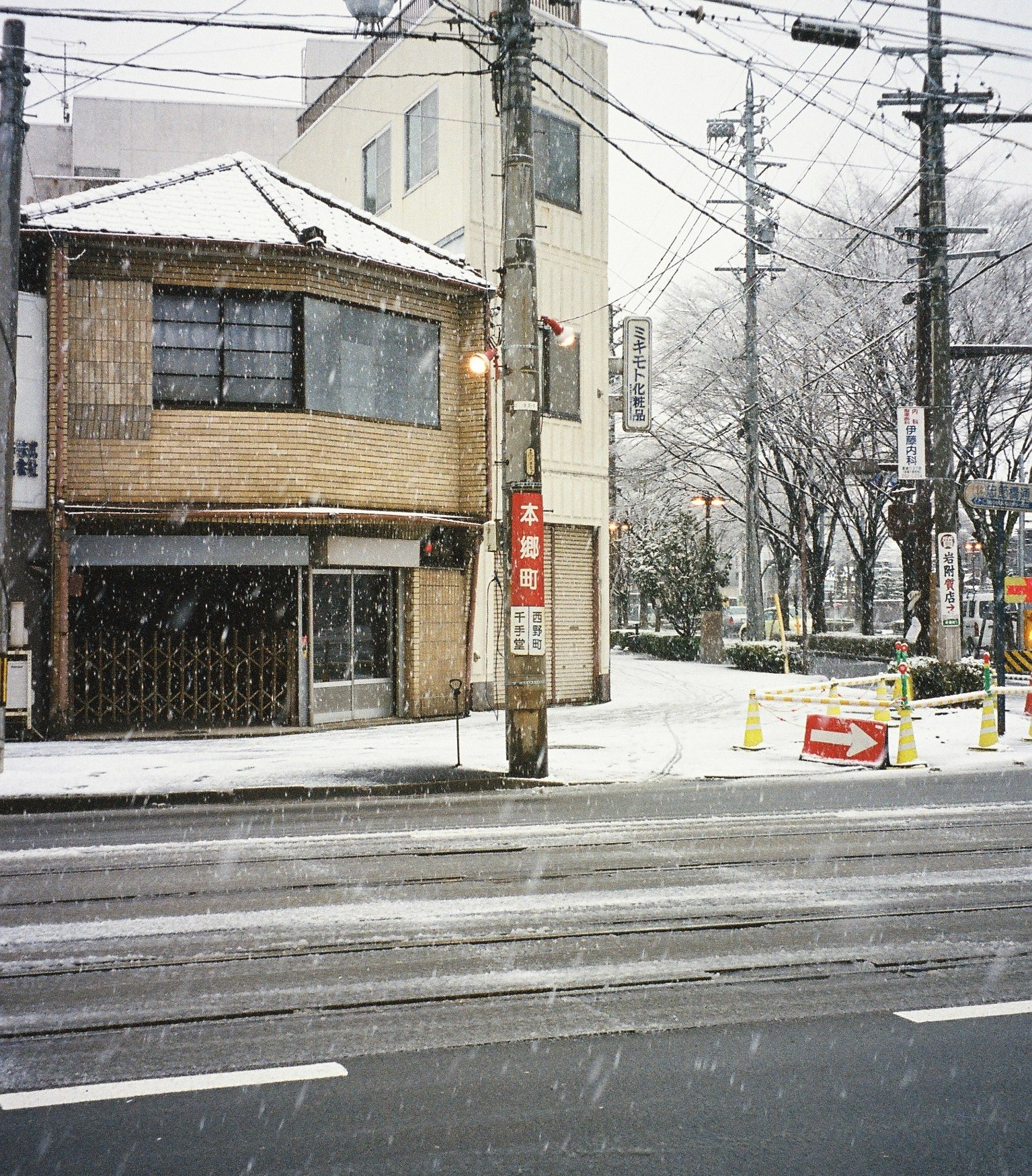 名古屋鉄道岐阜市内線本郷町駅（2004年12月撮影）